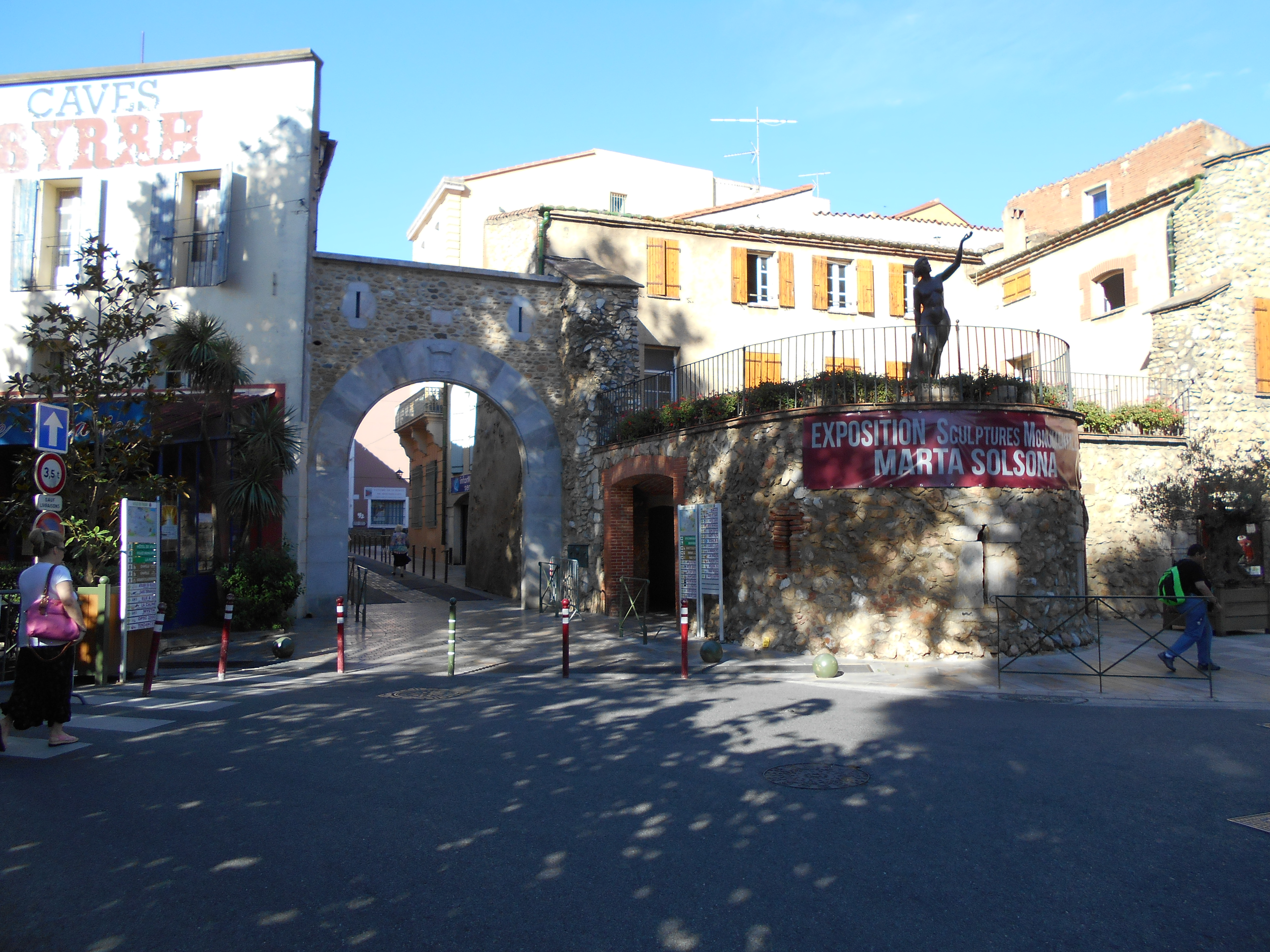 Portes i torres de les muralles